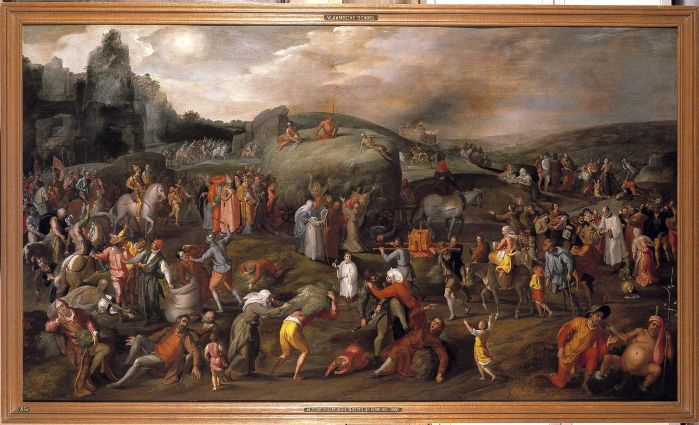 Allegorische voorstelling van de geestelijke en wereldlijke misbruiken; in de verschillende figuren en groepen verspreid over het paneel zijn de zeven hoofdzonden verwerkt.